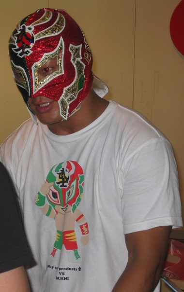 BUSHI（新日本プロレス、大阪大会6月16日）